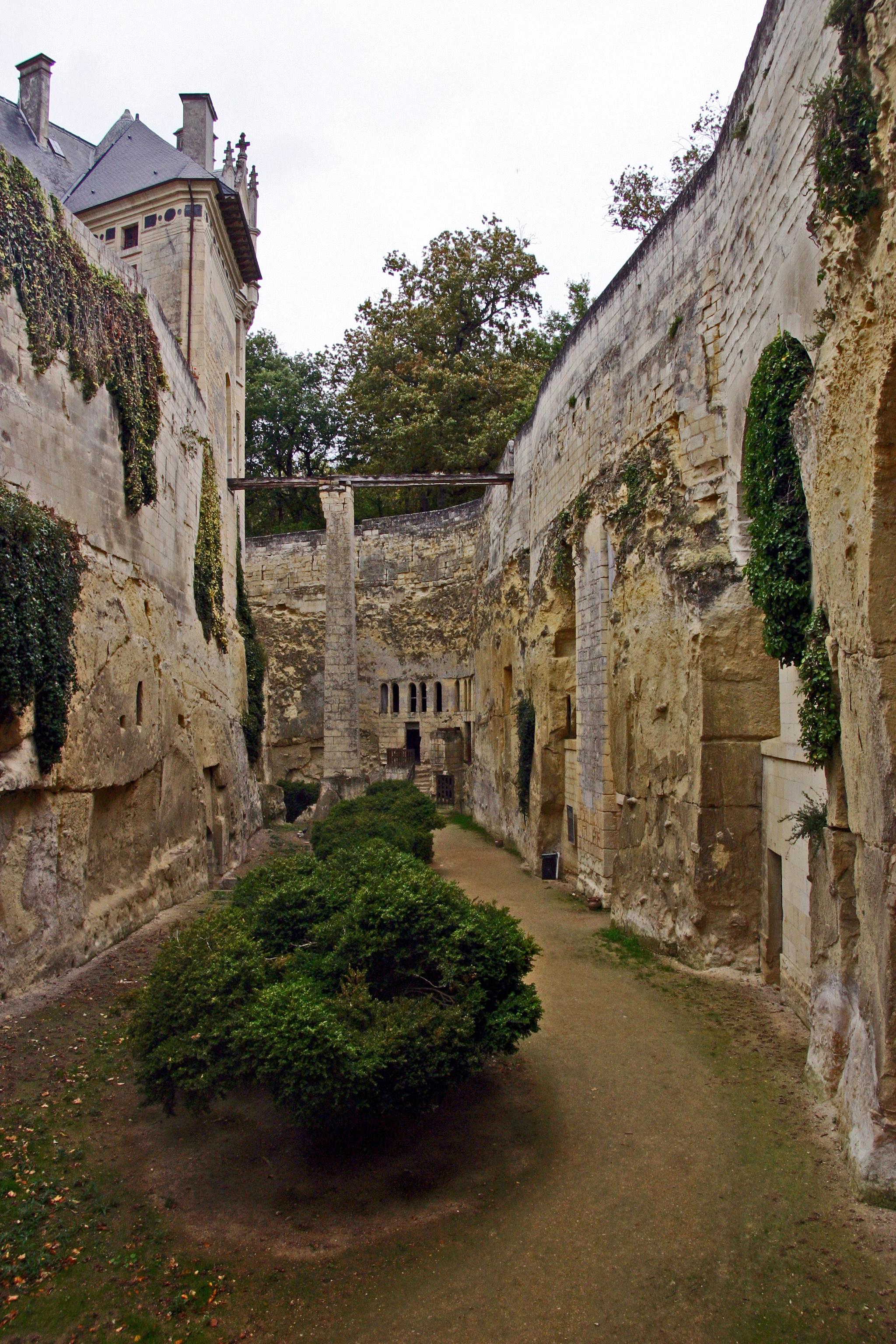 Schloss Brézé